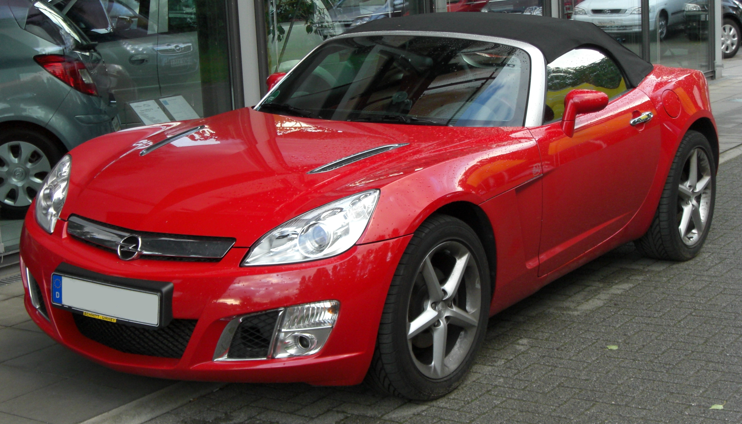 Opel GT